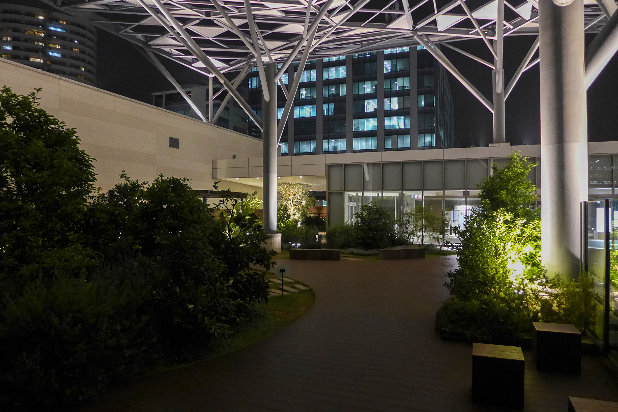 MARK IS minatomirai Level 5